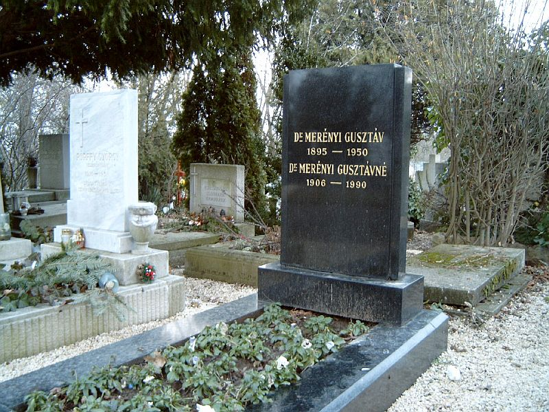 Merényi Gusztáv, Scholtz (Kassa, 1895. szept. 18. – Bp., 1950. aug. 19.): belgyógyász, orvos-vezérőrnagy sírja Budapesten. Farkasréti temető: 30/2-1-91.